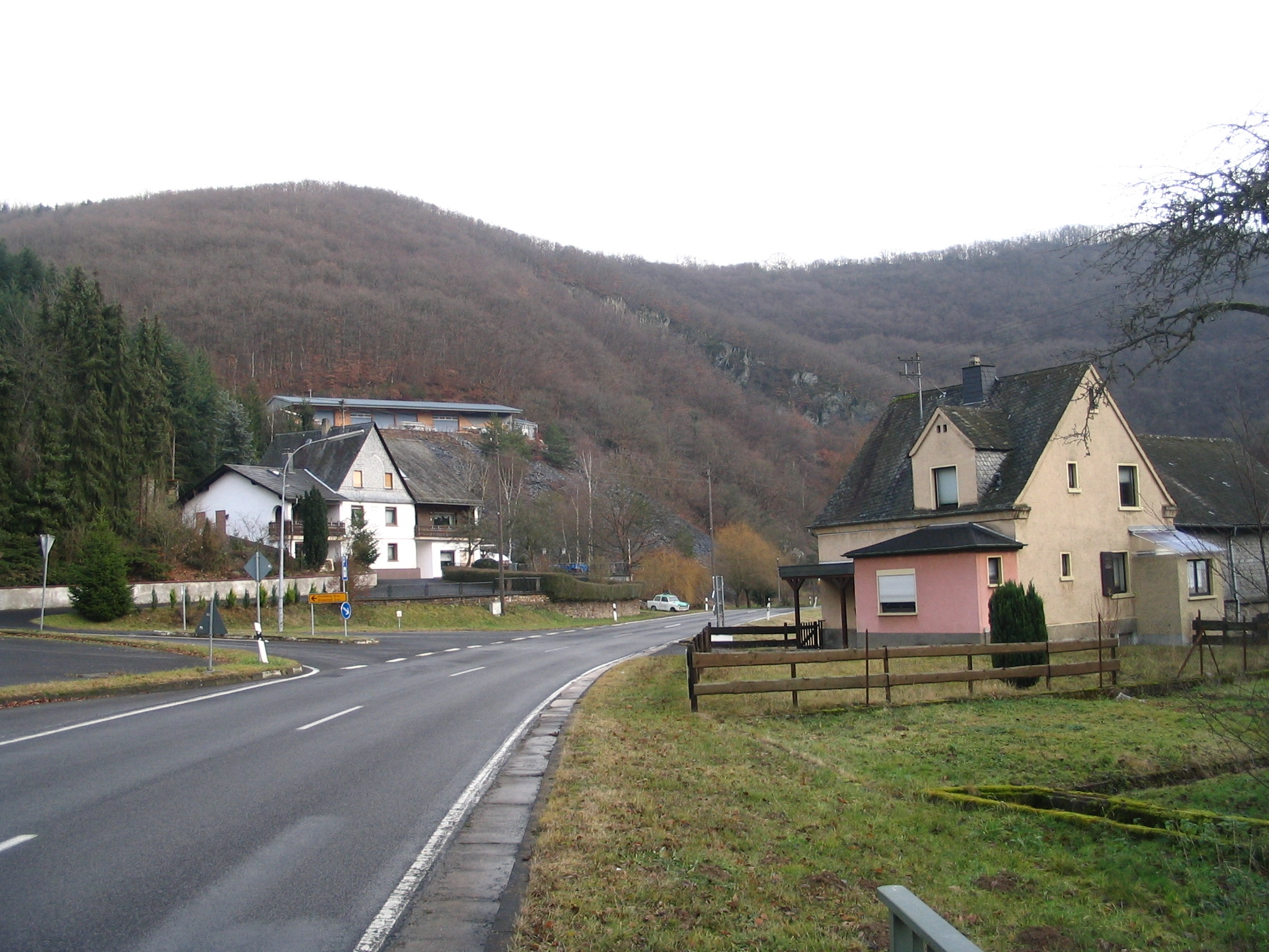 Rudolfshaus im Hahnenbachtal, Hunsrück